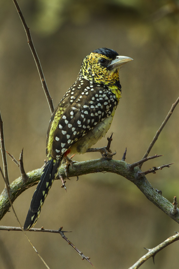 D'Arnaud's Barbet - Kenya_S4E5119